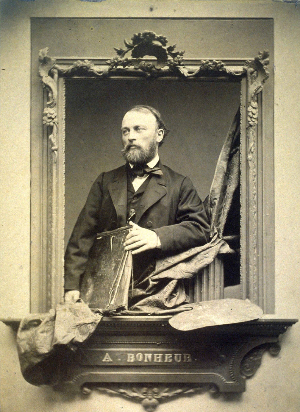 Portrait of Auguste-François Bonheur